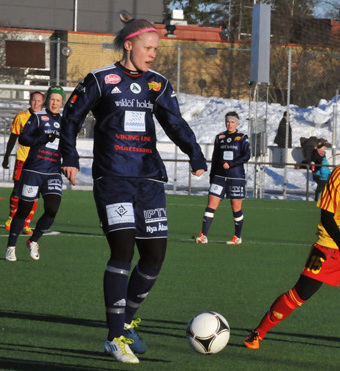 a_63_1093